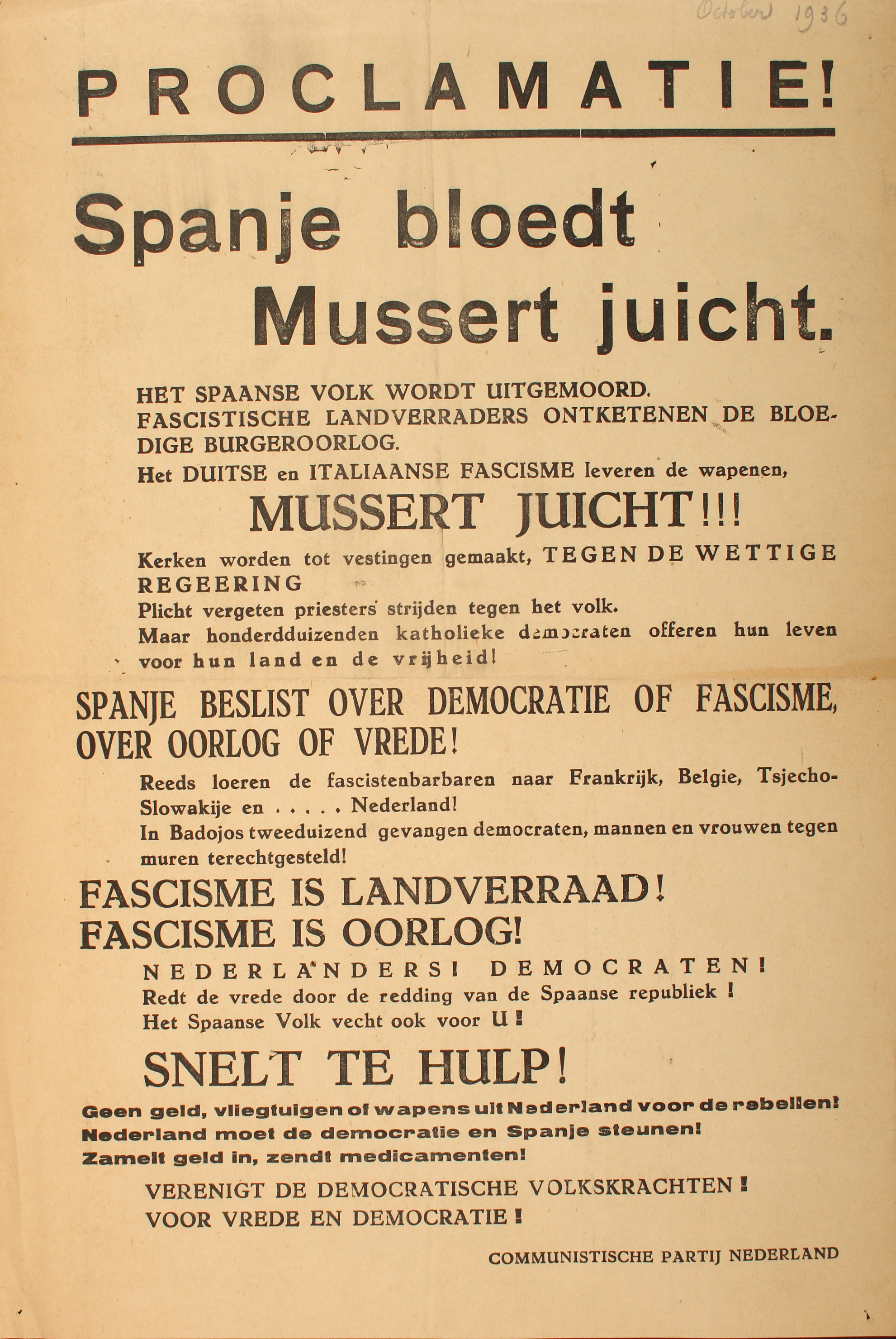 Proclamatie Spanje bloedt Mussert juicht Letteraffiche uit 1936 van de Communistische Partij Nederland, tegen Mussert en de NSB. Bij het openbaar komen van dit affiche is de burgeroorlog in Spanje in volle gang. De communisten doen een oproep om geld en medicamenten in te zamelen voor het Spaanse volk.